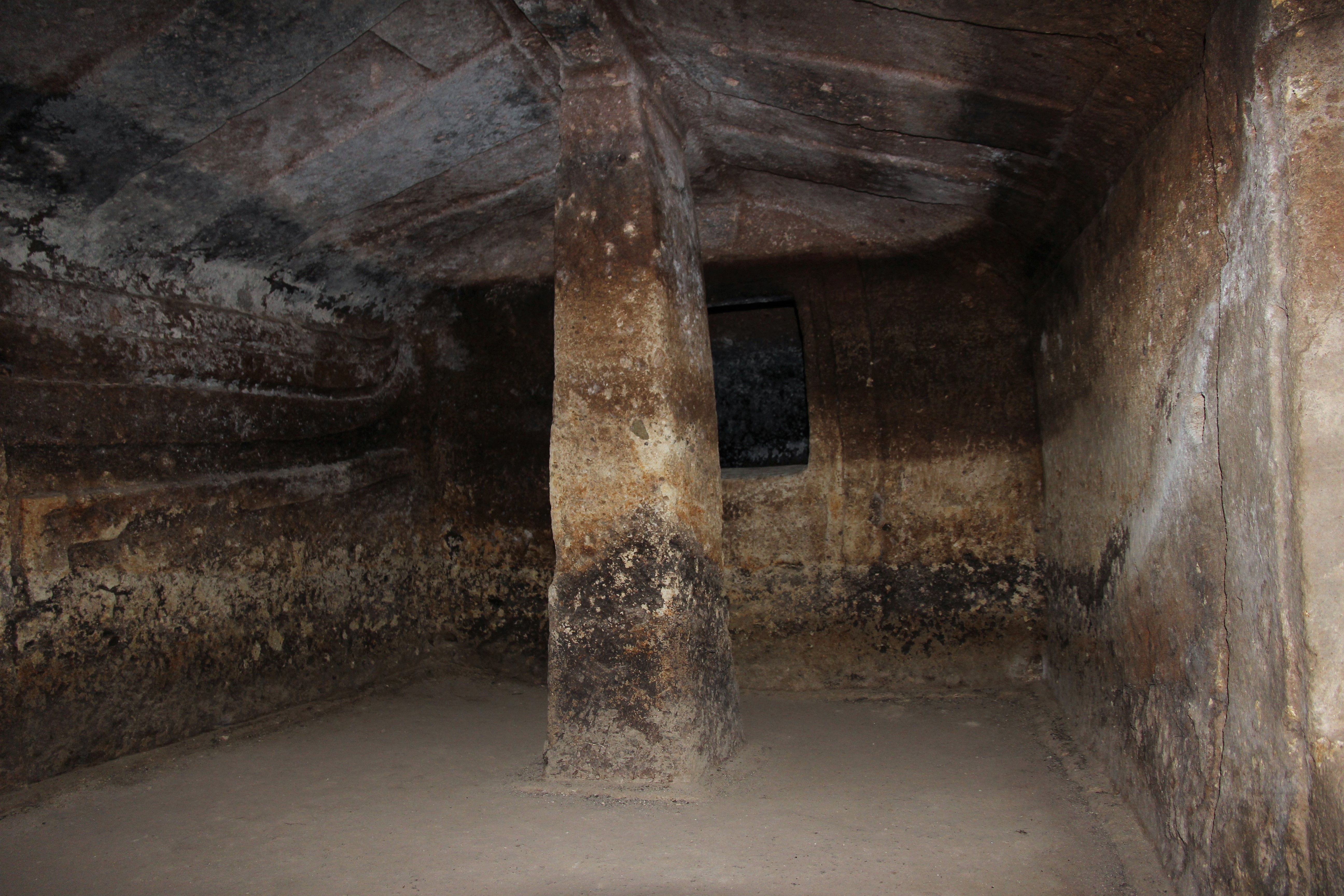 Putifigari, necropoli di Monte Siseri